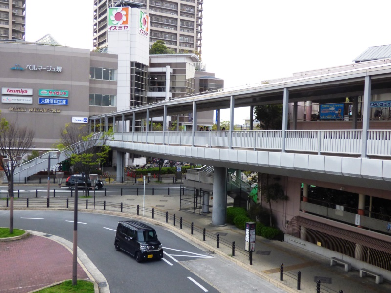 堺市駅とベルマージュ堺・イズミヤを結ぶペデストリアンデッキ。